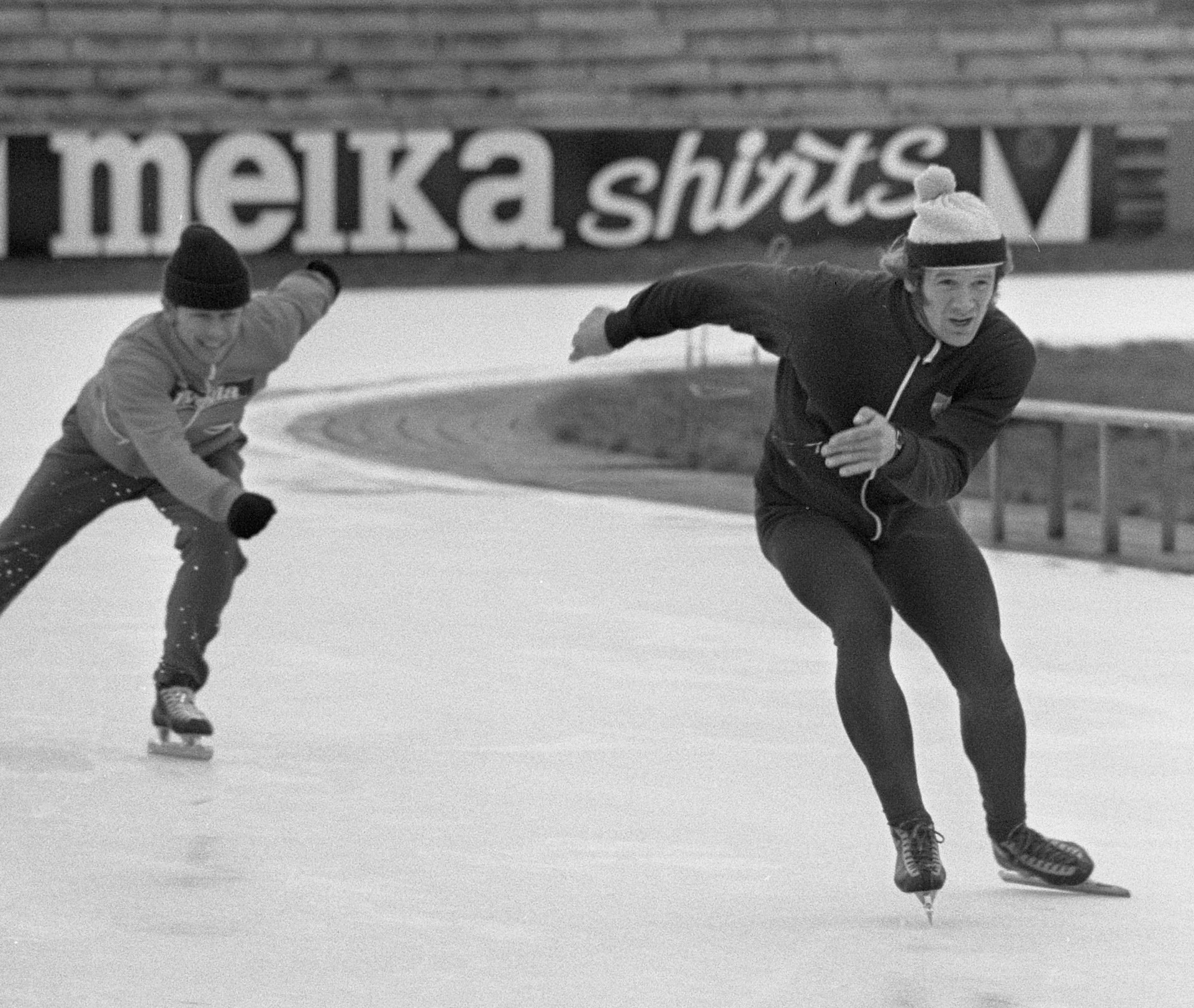 Hans van Helden traint op Thialfkunstijsbaan te Heerenveen, links zijn trainer Henk Gemser